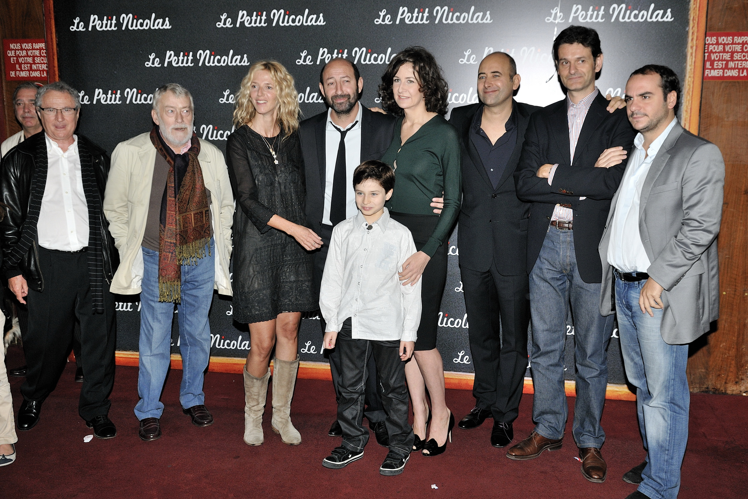 Avant-première du film Le Petit Nicolas au Grand Rex, à Paris, le 20 Septembre 2009, en présence de toute l'équipe de film. De gauche à droite : Daniel Prévost, Michel Duchaussoy, Sandrine Kiberlain, Kad Merad, Maxime Godart, Valérie Lemercier, Laurent Tirard, (?), François-Xavier Demaison.